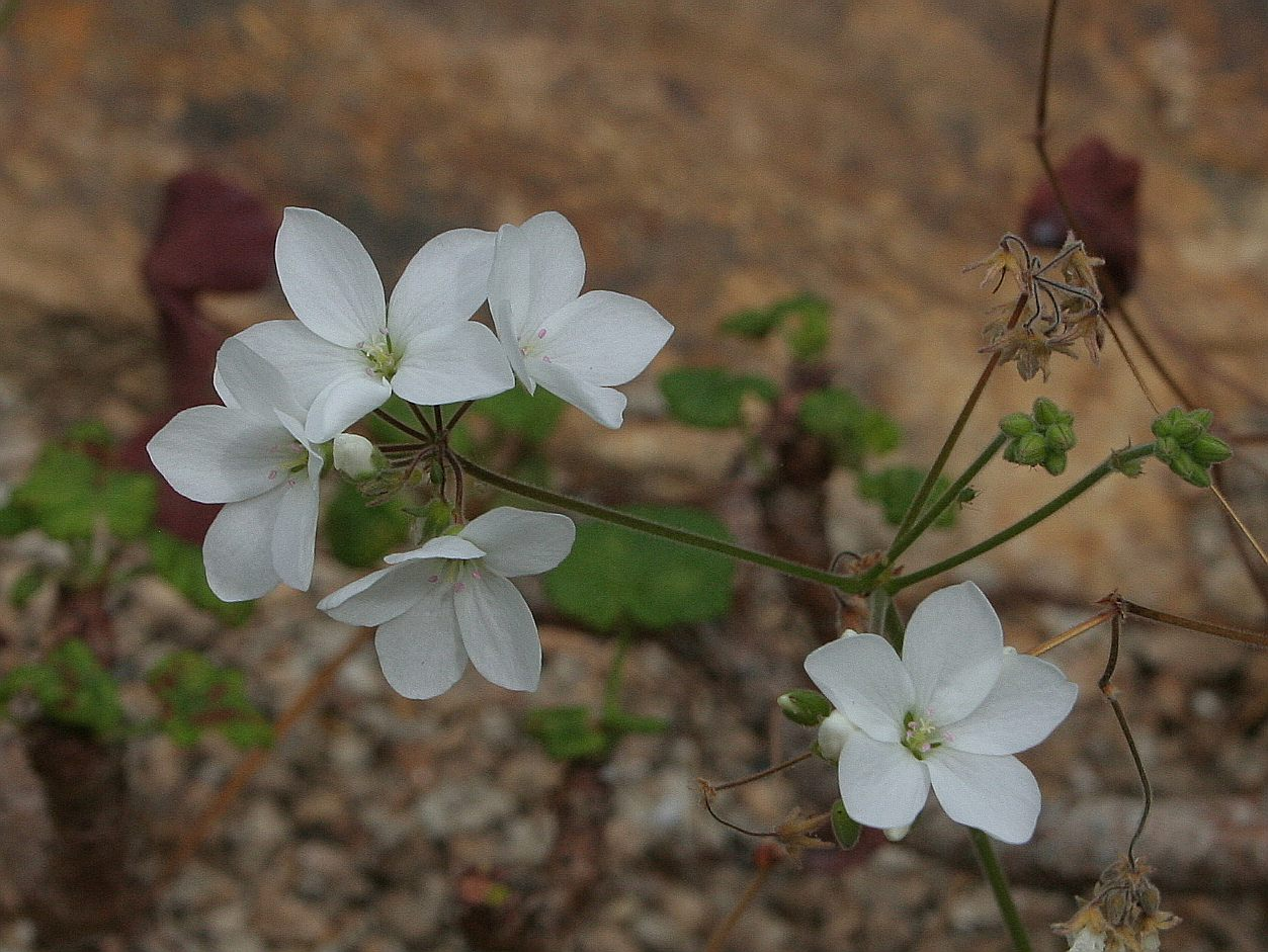 Pelargonium cotyledonis Conservatoire botanique national de Brest, France, 2007